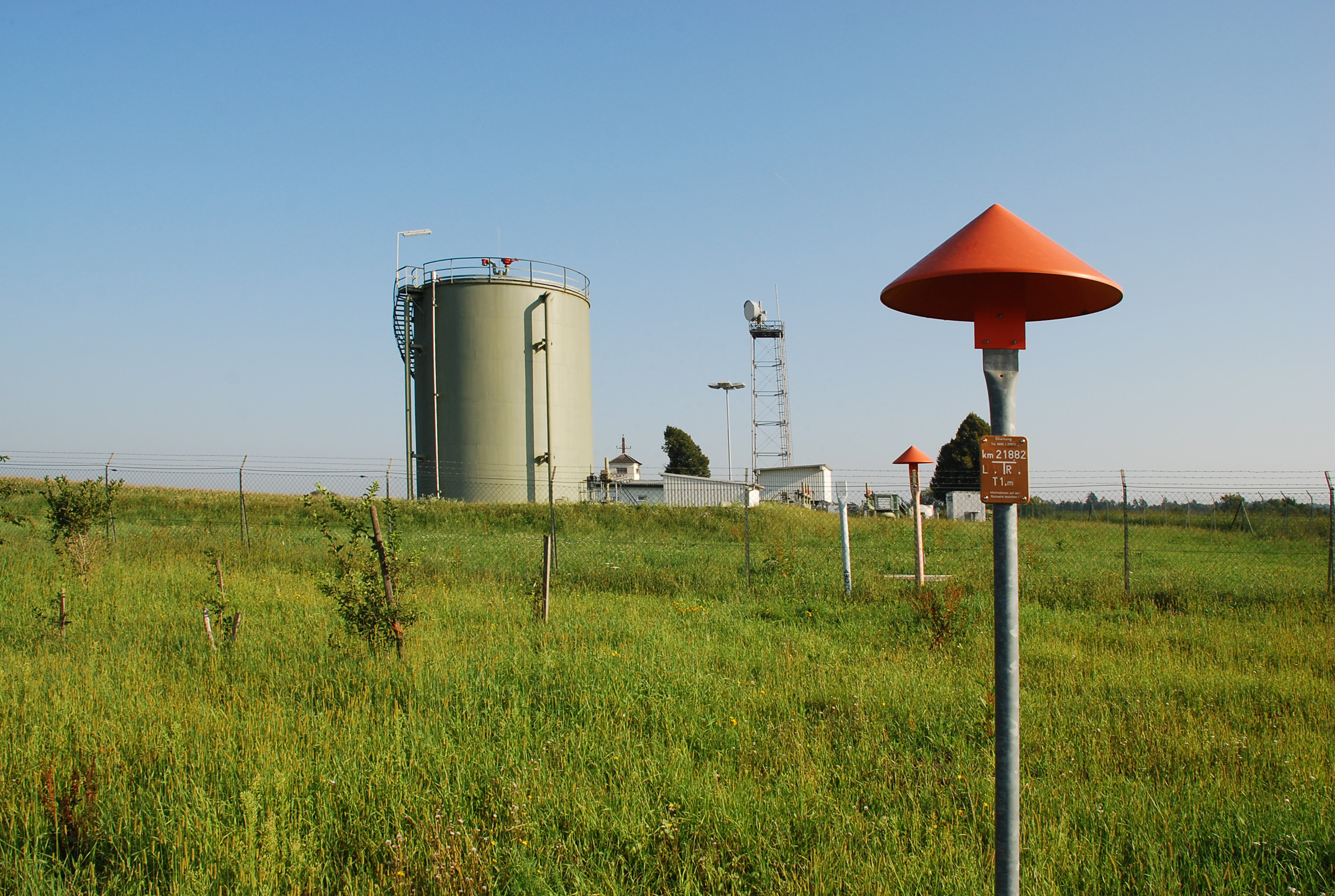 bronzezeitliche Siedlung Wohlsdorf bei Wettmannstätten, Steiermark, Österreich: Station der Adria-Wien-Ölpipeline